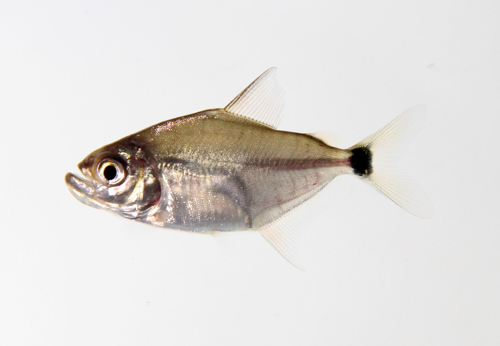 Catoprion mento (juvenile)